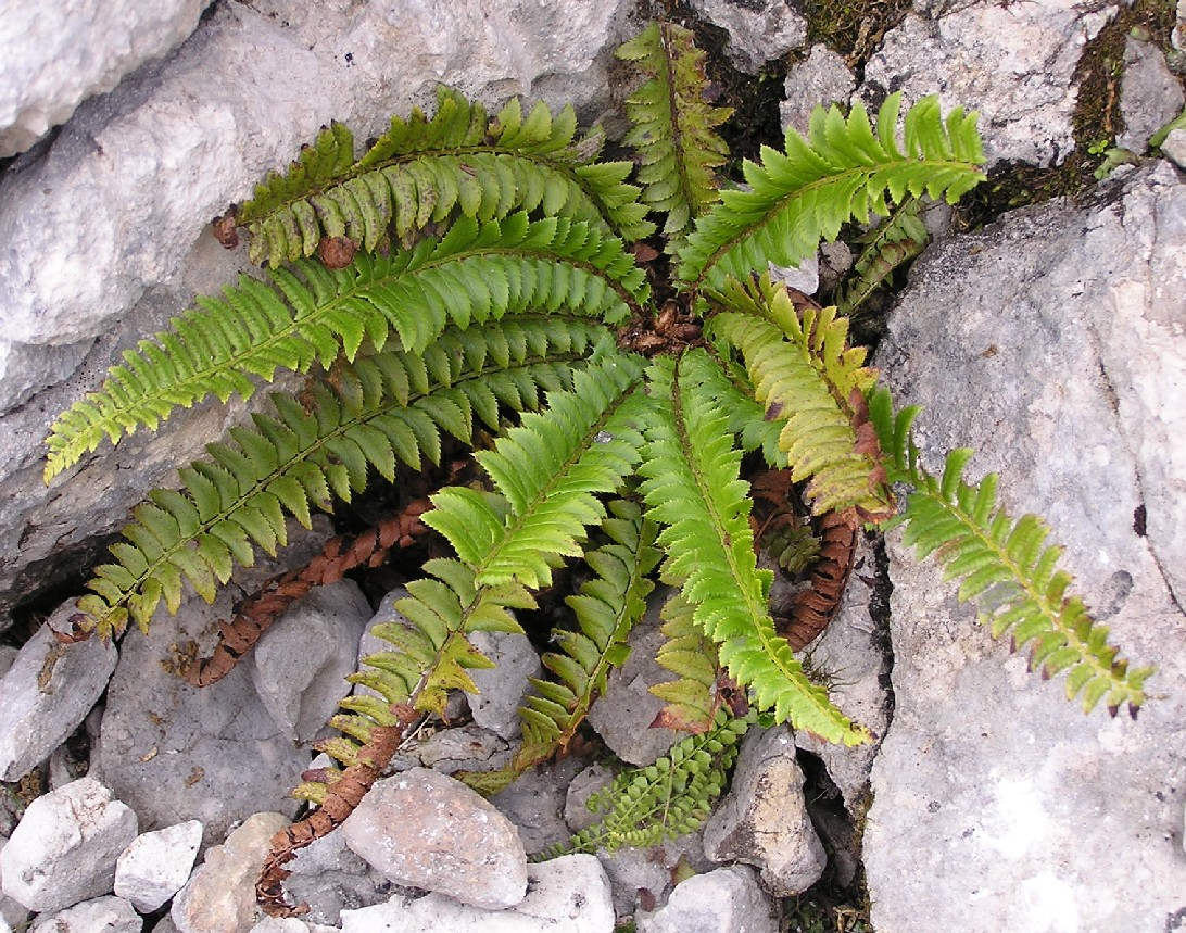 Polystichum lonchitis in einer Kalkfelsspalte auf dem Krippenstein in Österreich.